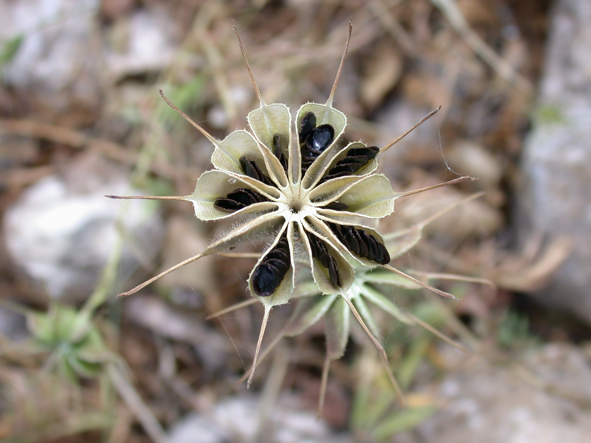 Nigella ciliaris DC. (קצח ריסני), Mount Carmel, Israel, April 29, 2008.